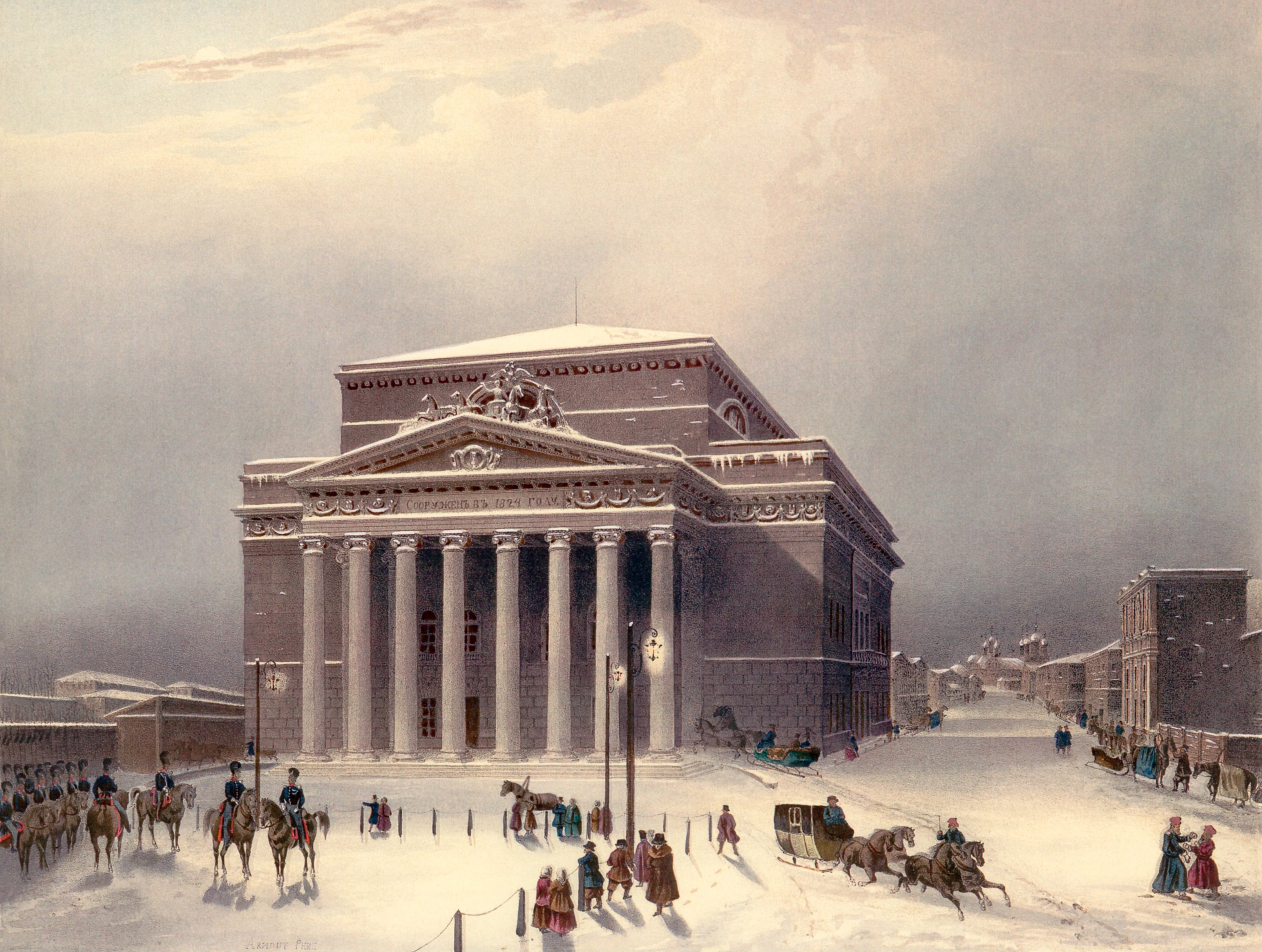 View of Bolshoi Вид Большого Театра